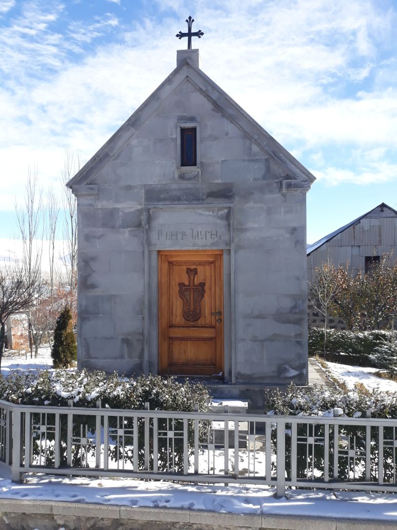 Սուրբ Նարեկ մատուռ, Արագածոտնի մարզ, Վարդենիս գյուղ